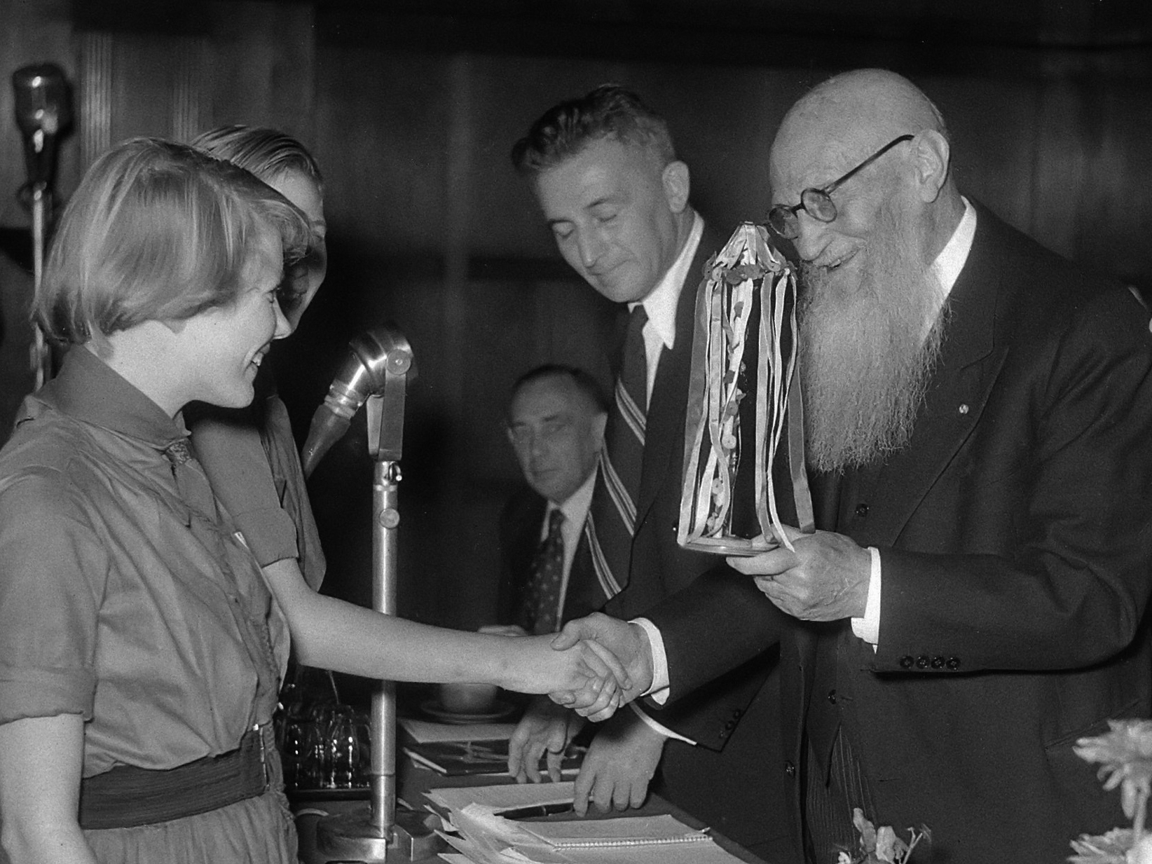 Jan van Zutphen 90 jaar huldiging 4 oktober 1953